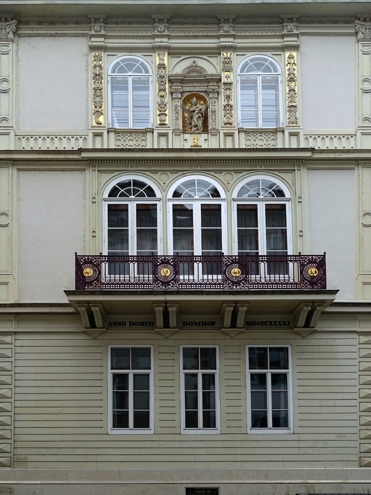 1841 Anbau des Flügels im Domhof gegen den Münsterberg von Christoph Riggenbach. Madonna in der Nische aus dem 16.Jahrhundert